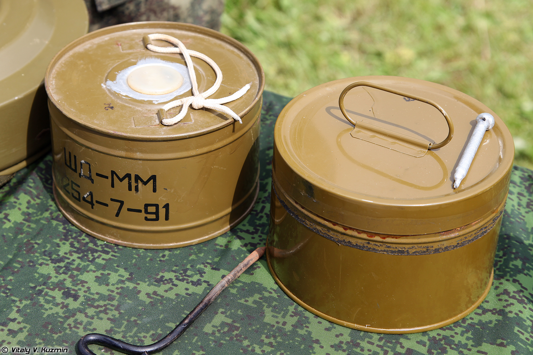 Дымовые шашки малые ШД-ММ и ДМ-11 (ShD-MM and DM-11 smoke grenades)